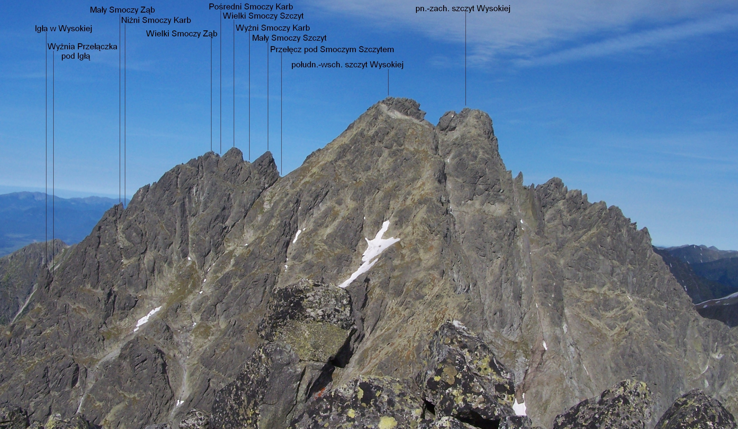 Wysoka, widok z Ganku